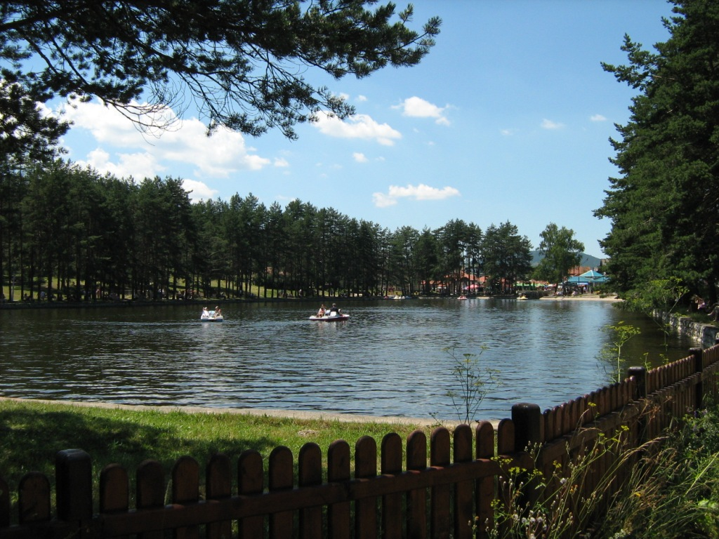 Zlatborsko jezero